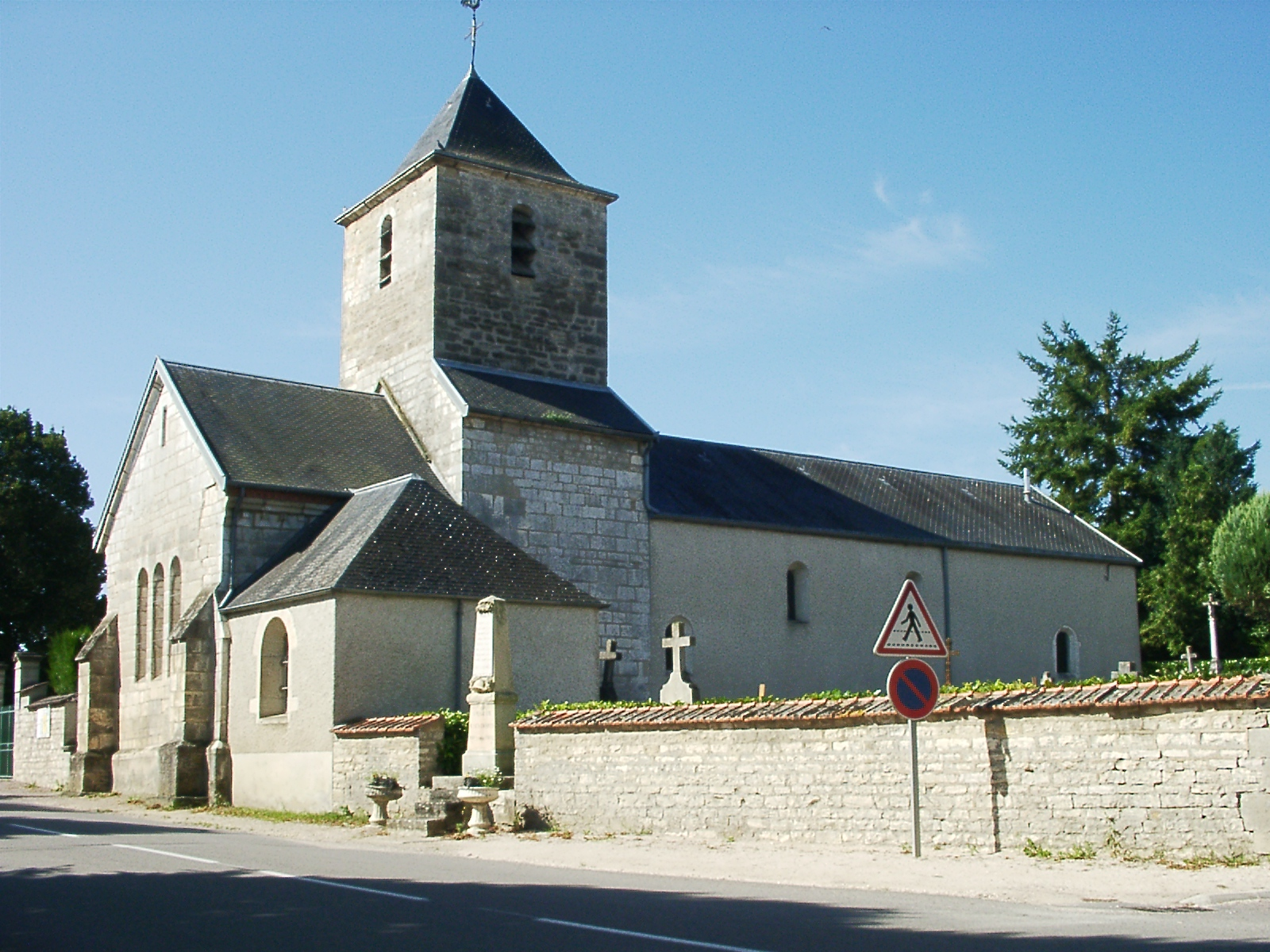 Orgeux - Eglise de l'Assomption